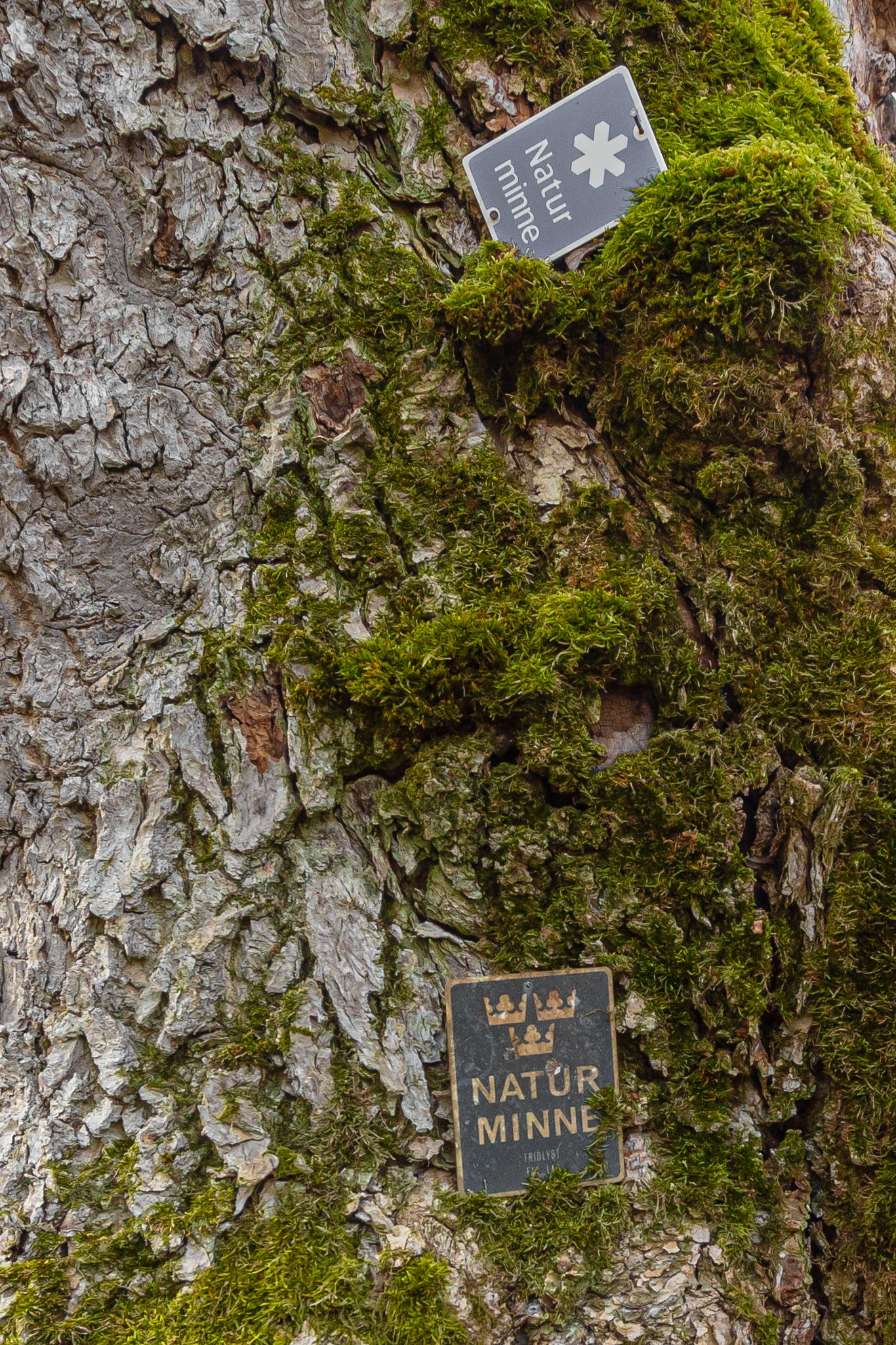 En ask på fastighet Gäsjö 6:1, Norbergs kommun, Västmanlands län, Sverige, en dimmig morgon. Naturminne sedan 1968-09-25.